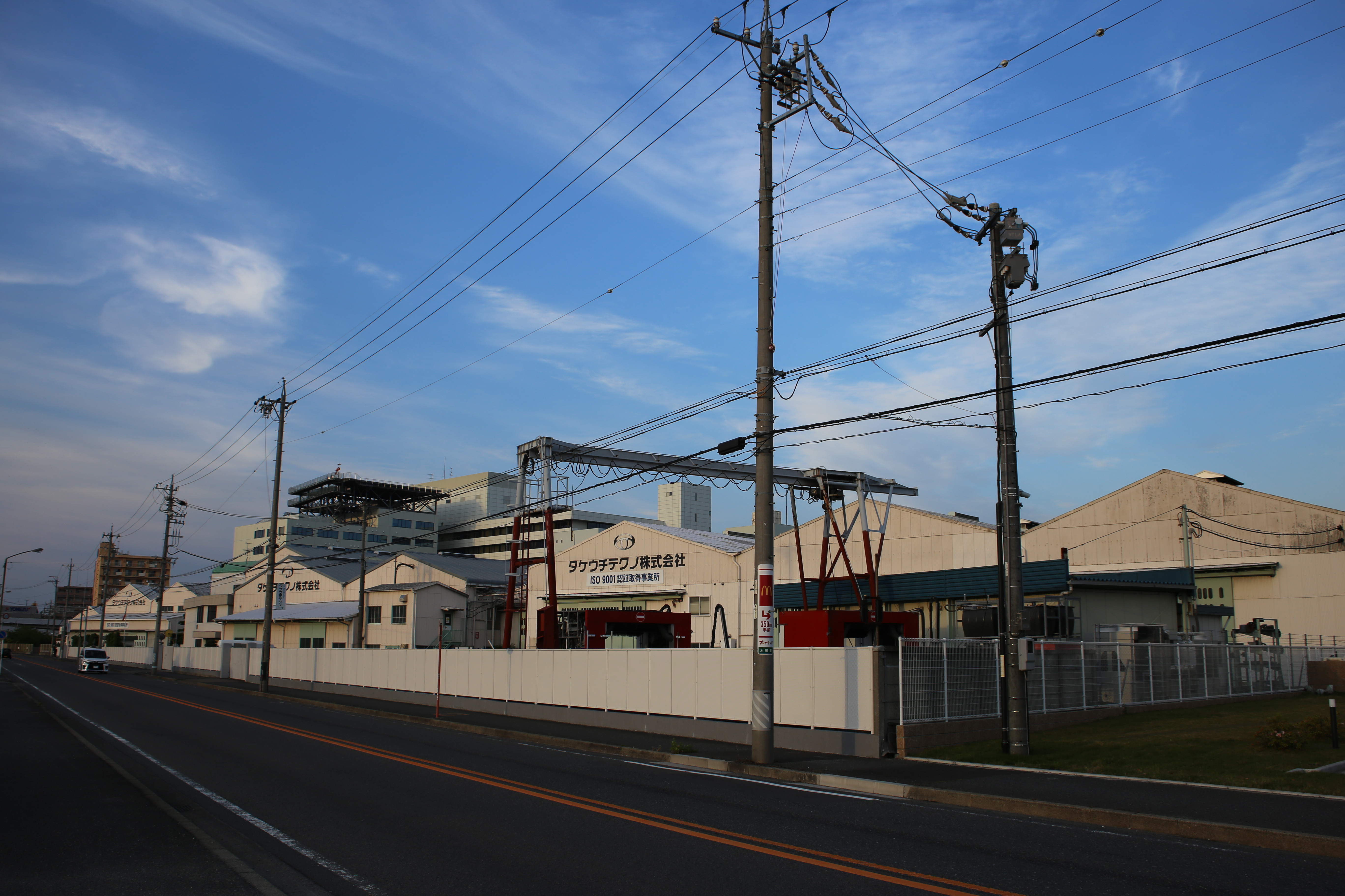 名古屋市港区木場町のタケウチテクノ本社を西側公道南側より撮影